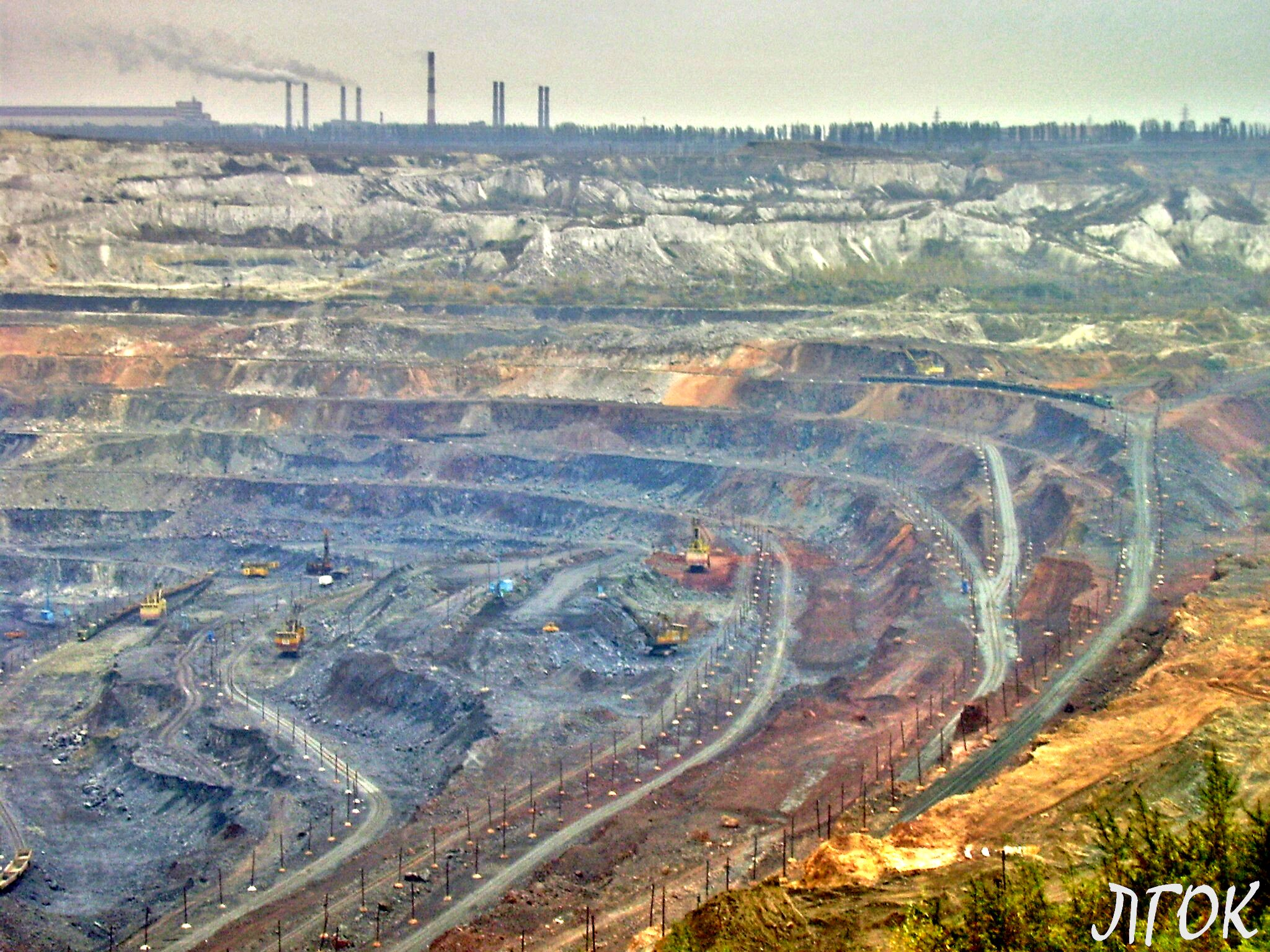 Карьер Лебединский горно-обогатительного комбината